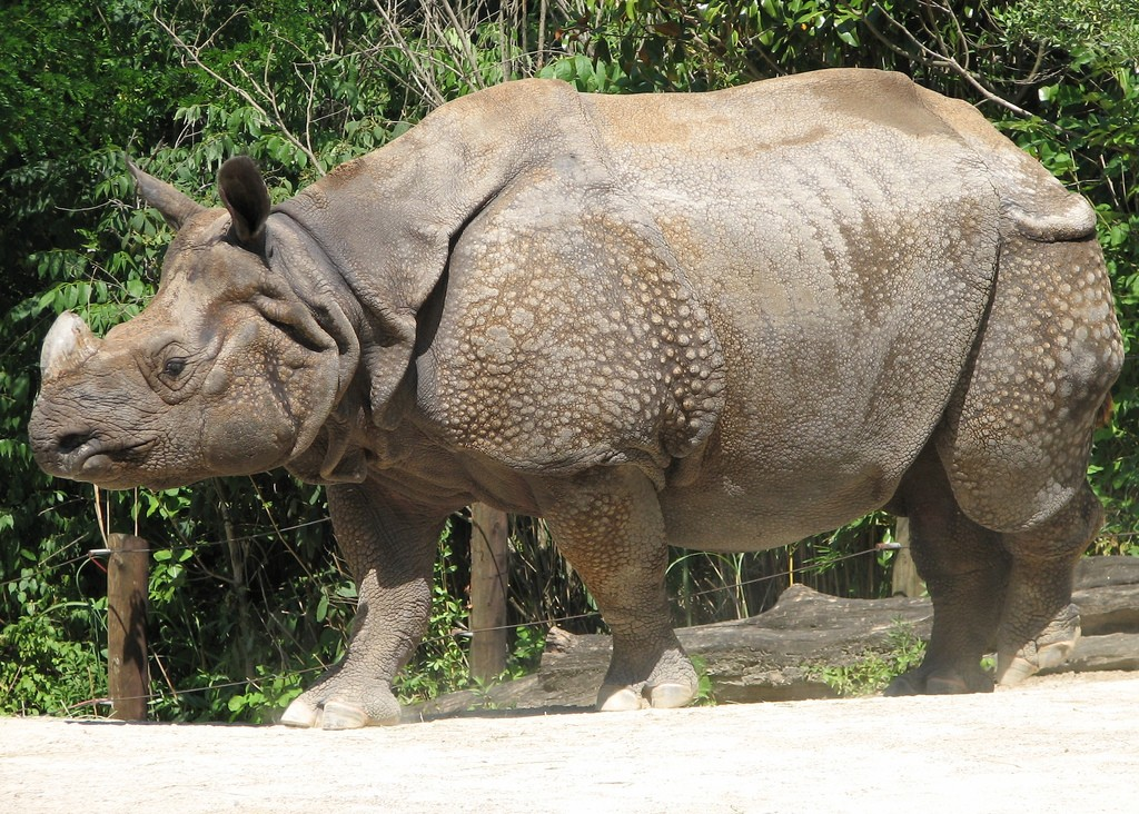 Indian Rhino at Cincinnati Zoo